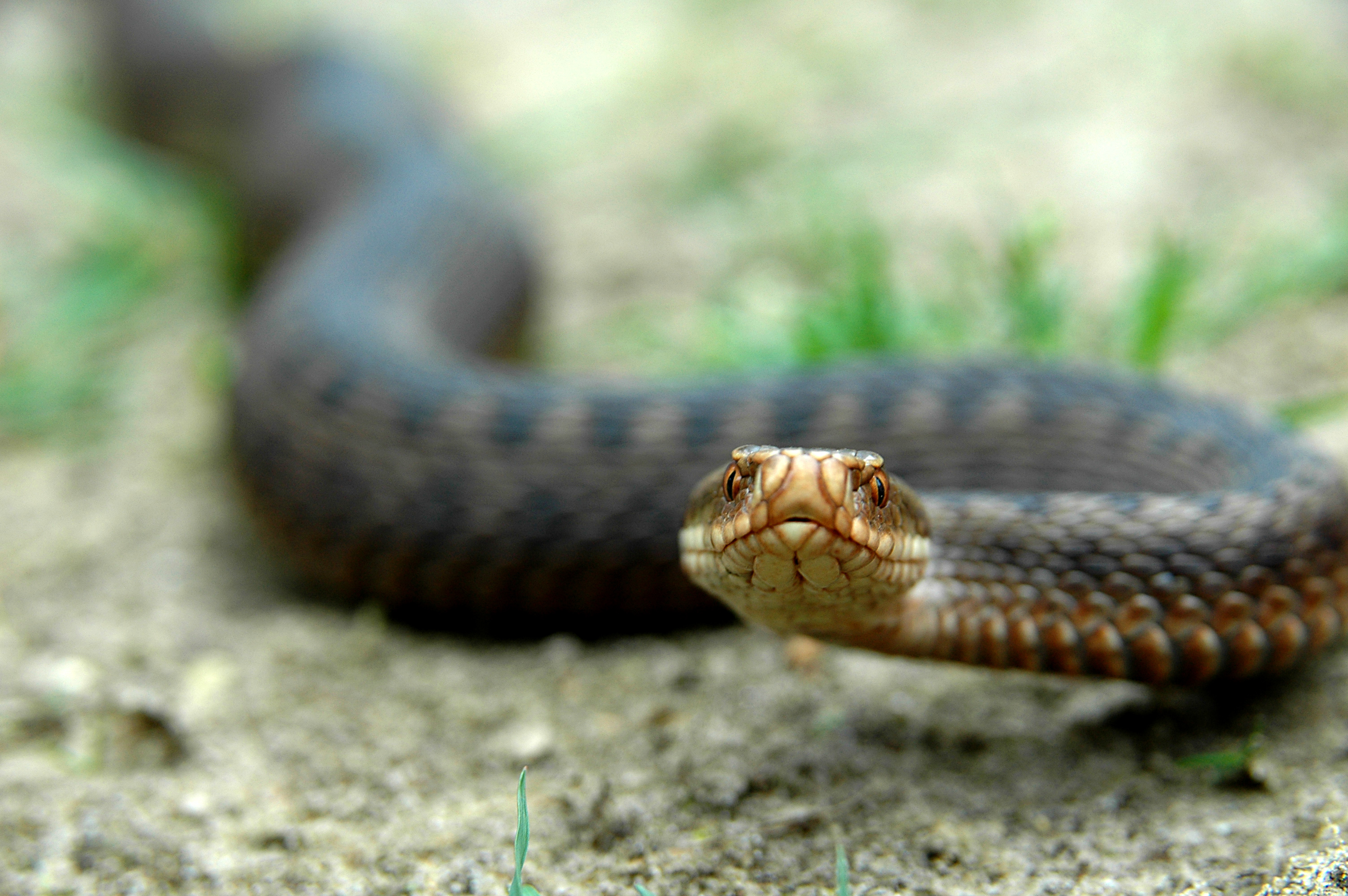 Gewone Adder (Vipera berus) in aanvalshouding. Locatie: Nationaal Park De Meinweg, Limburg, Nederland / Common European adder (Vipera berus) in striking position. Location: Nationaal Park De Meinweg, Limburg, The Netherlands